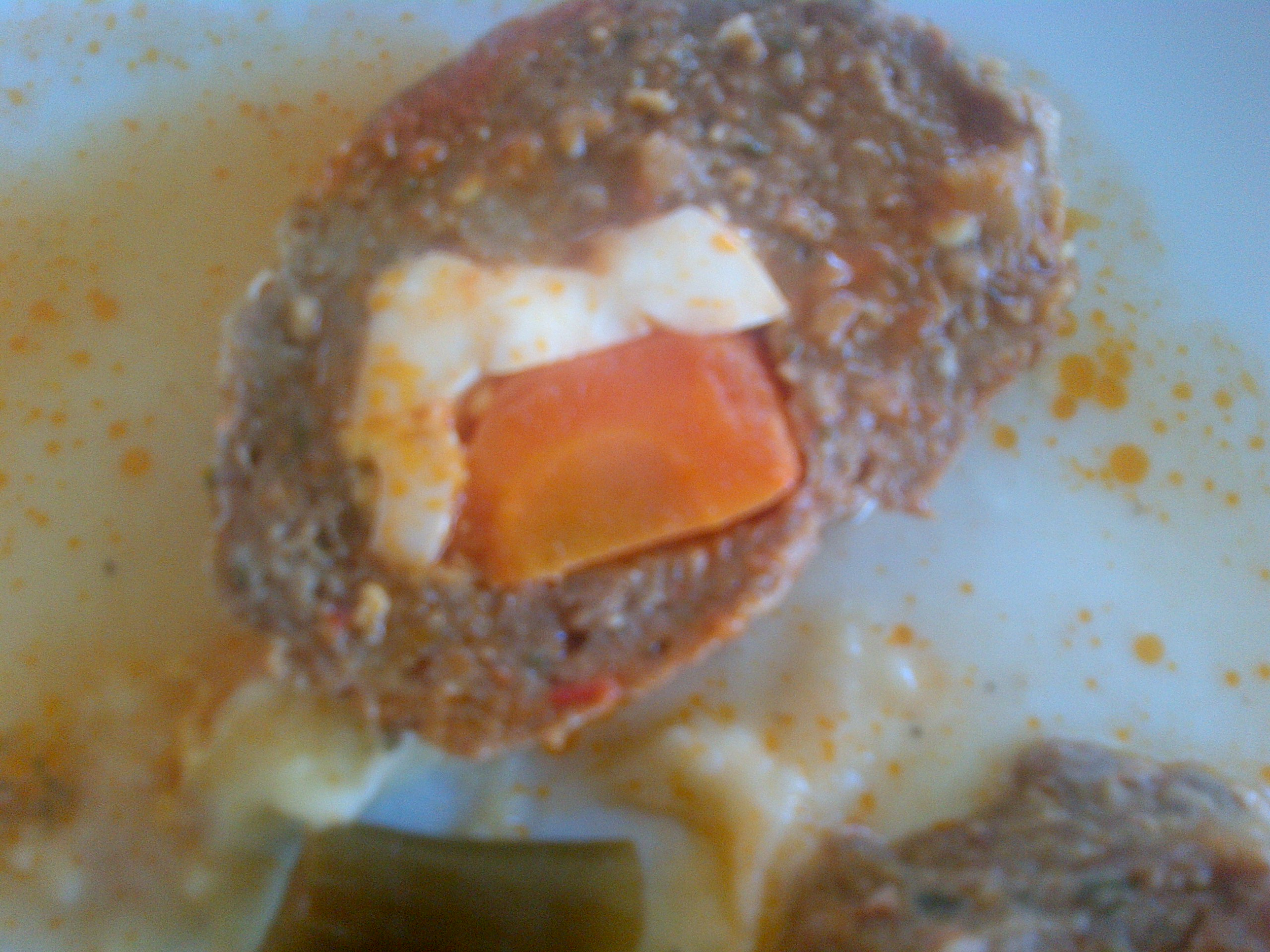 El detalle de un "dalyan köfte".